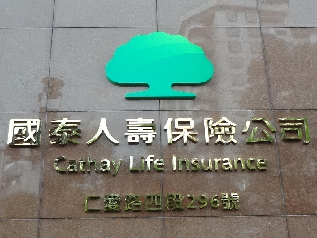 國泰人壽大樓上的國泰人壽商標及公司名稱標準字。